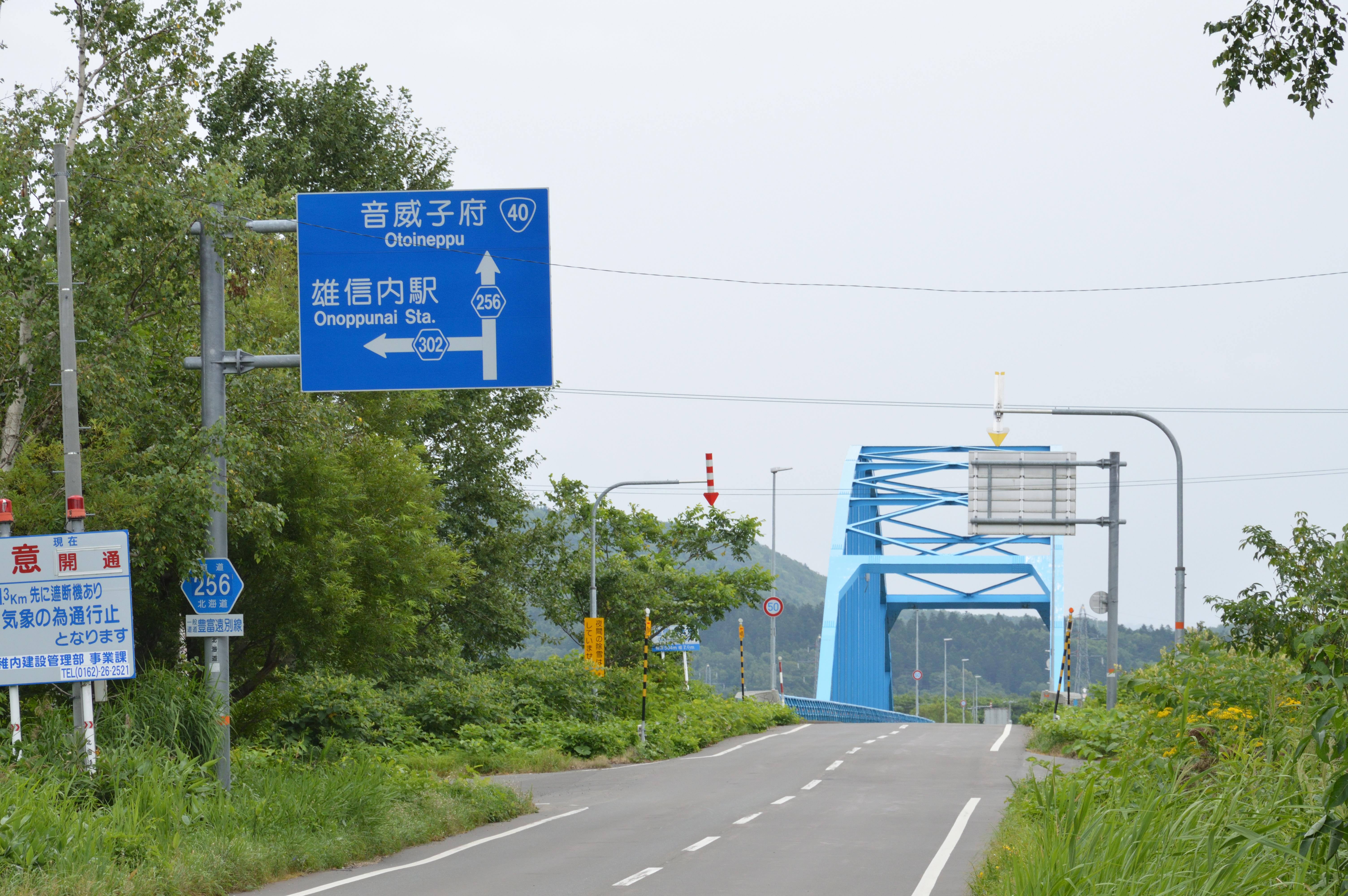 北海道道256号雄信内停車場線（幌延町雄興 雄信内大橋・道道302号分岐地点）